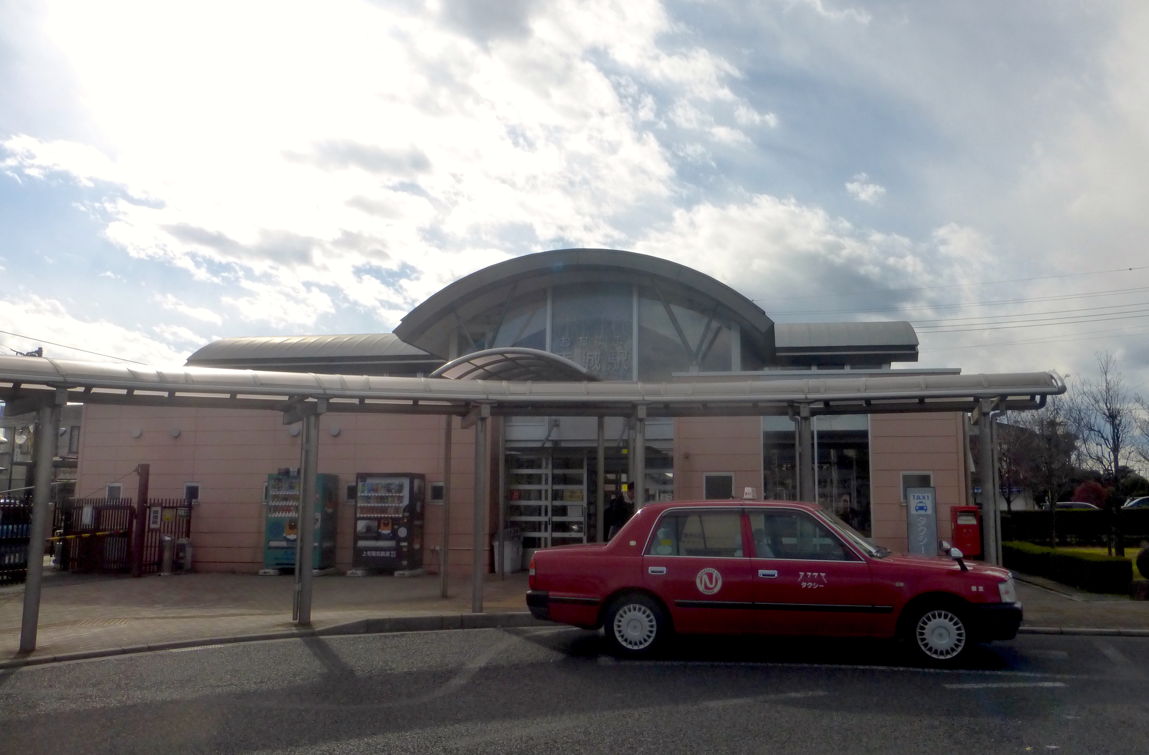 Akagi Station (赤城駅)